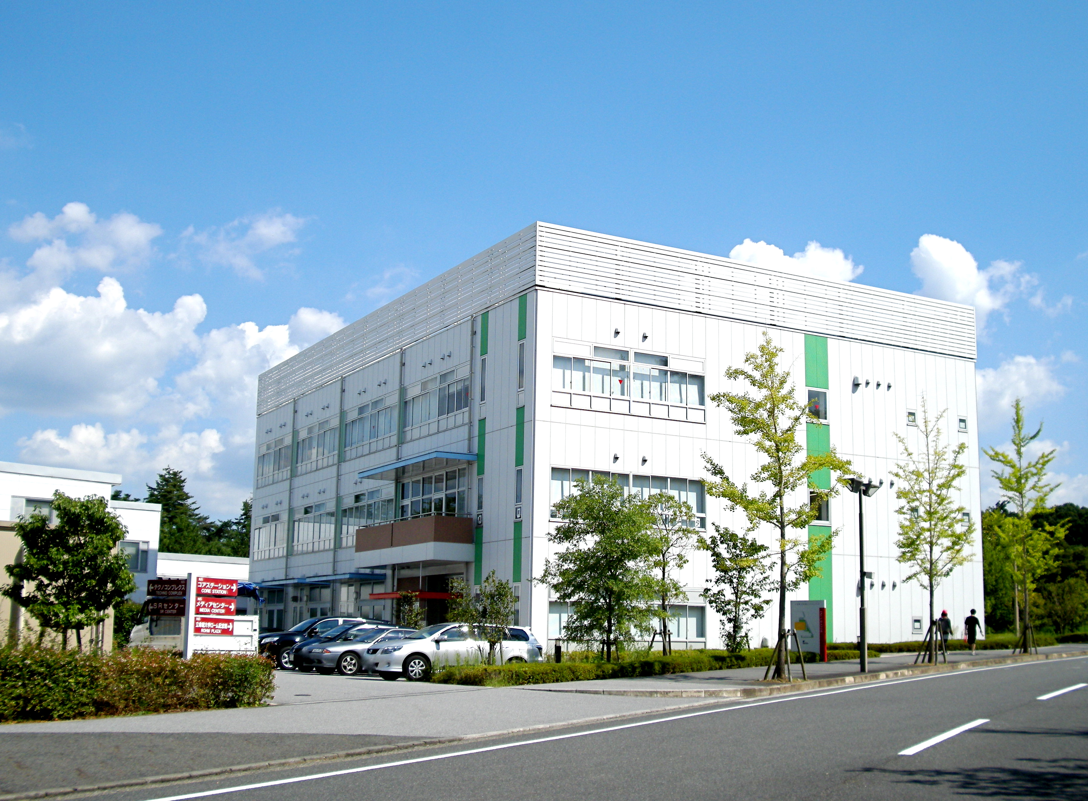 BKC Incubator (Biwako Kusatsu Campus, Ritsumeikan University, Japan)